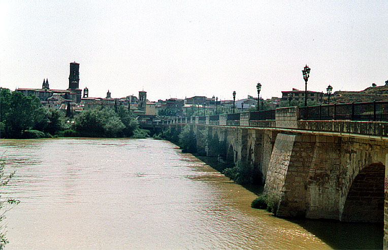 Puente sobre el rio Ebro en Tudela